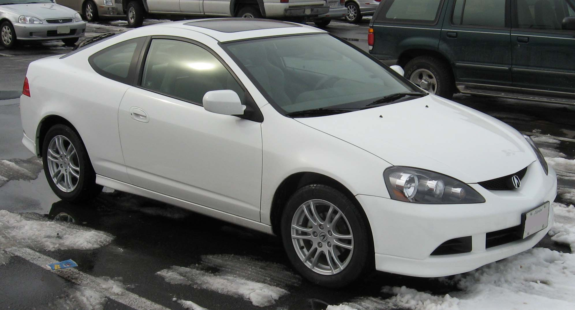 2005 Acura RSX